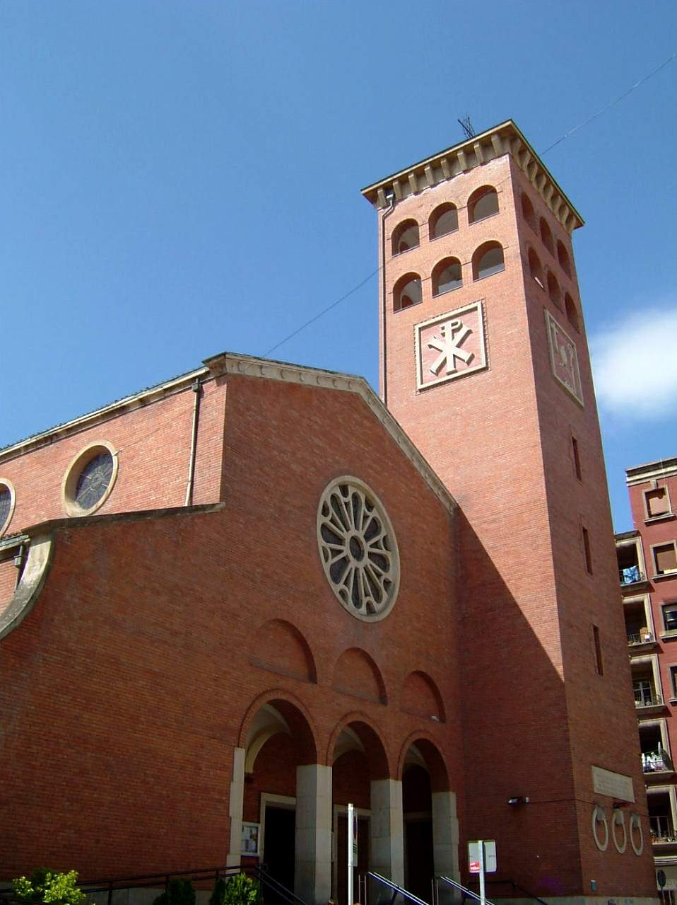 Iglesia de San Nicolás - Miranda de Ebro - España